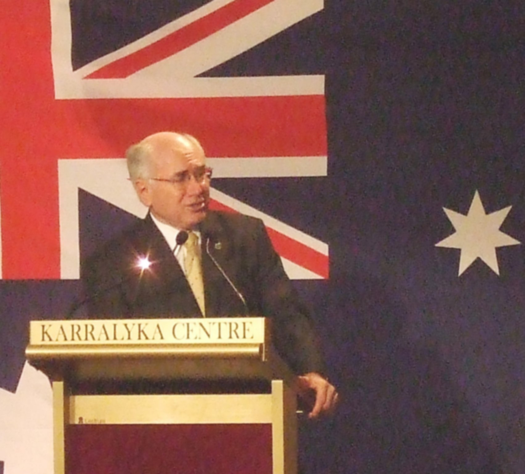 John Howard, 31 August, 2007